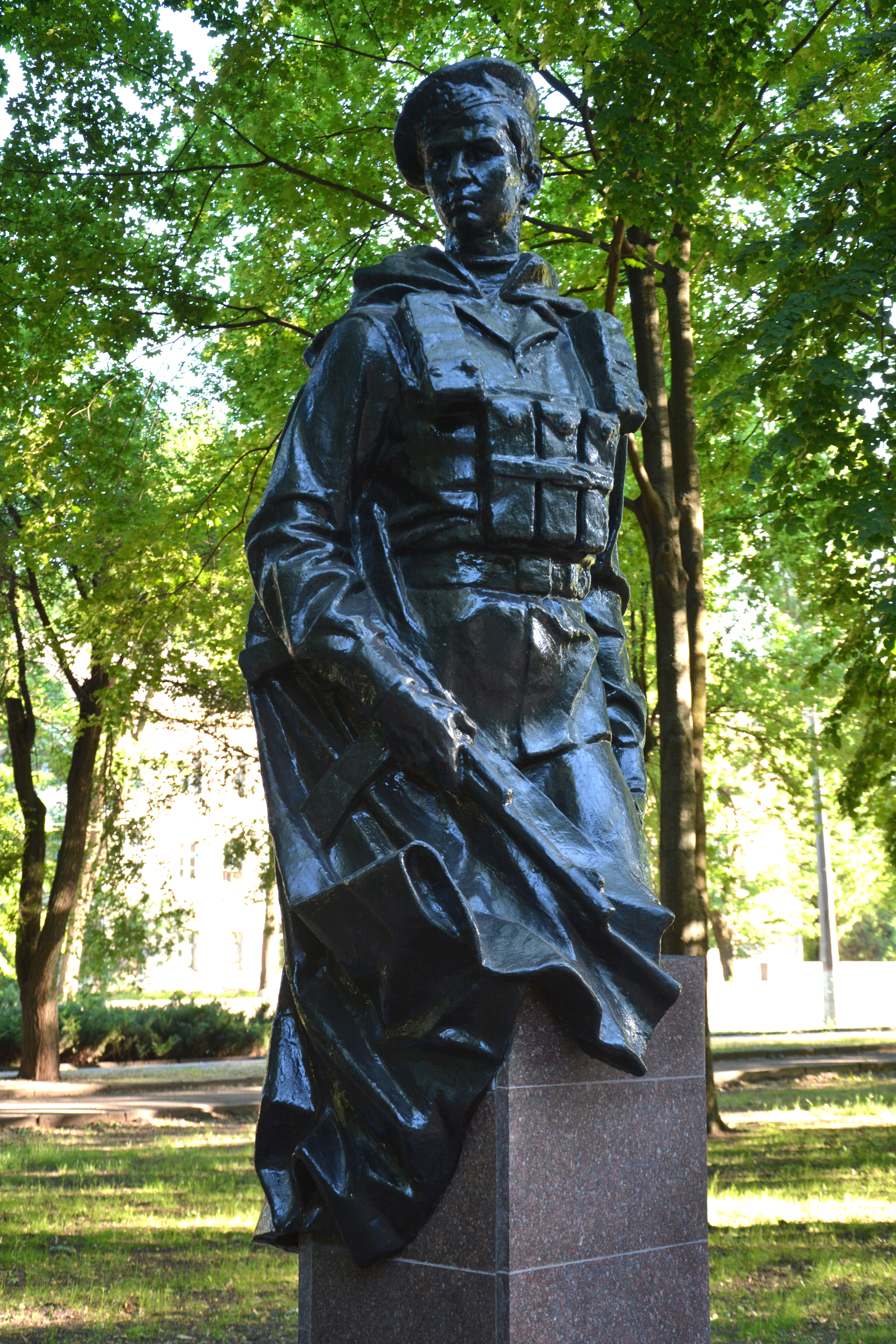 Пам’ятник воїнам-інтернаціоналістам, Кривий Ріг, восени 2013р. демонтовано з "Скверу Героїв", що біля міськвиконкому, та перенесено на алею Небесної Сотні, у сквер на пр.Миру, між виконкомом Дзержинського р-ну та монументом "Перемога"